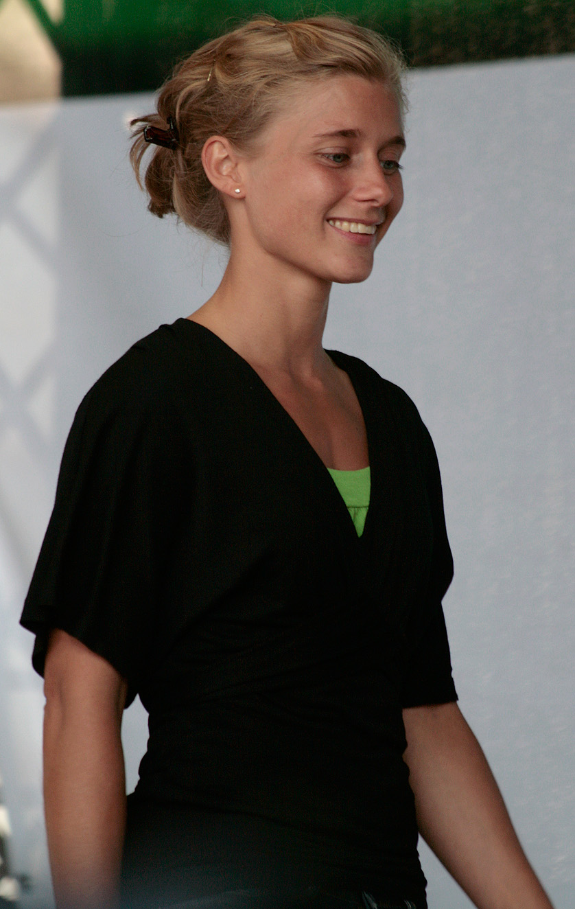 Maria Schreil am Tag des Sports 2009 auf dem Heldenplatz in Wien